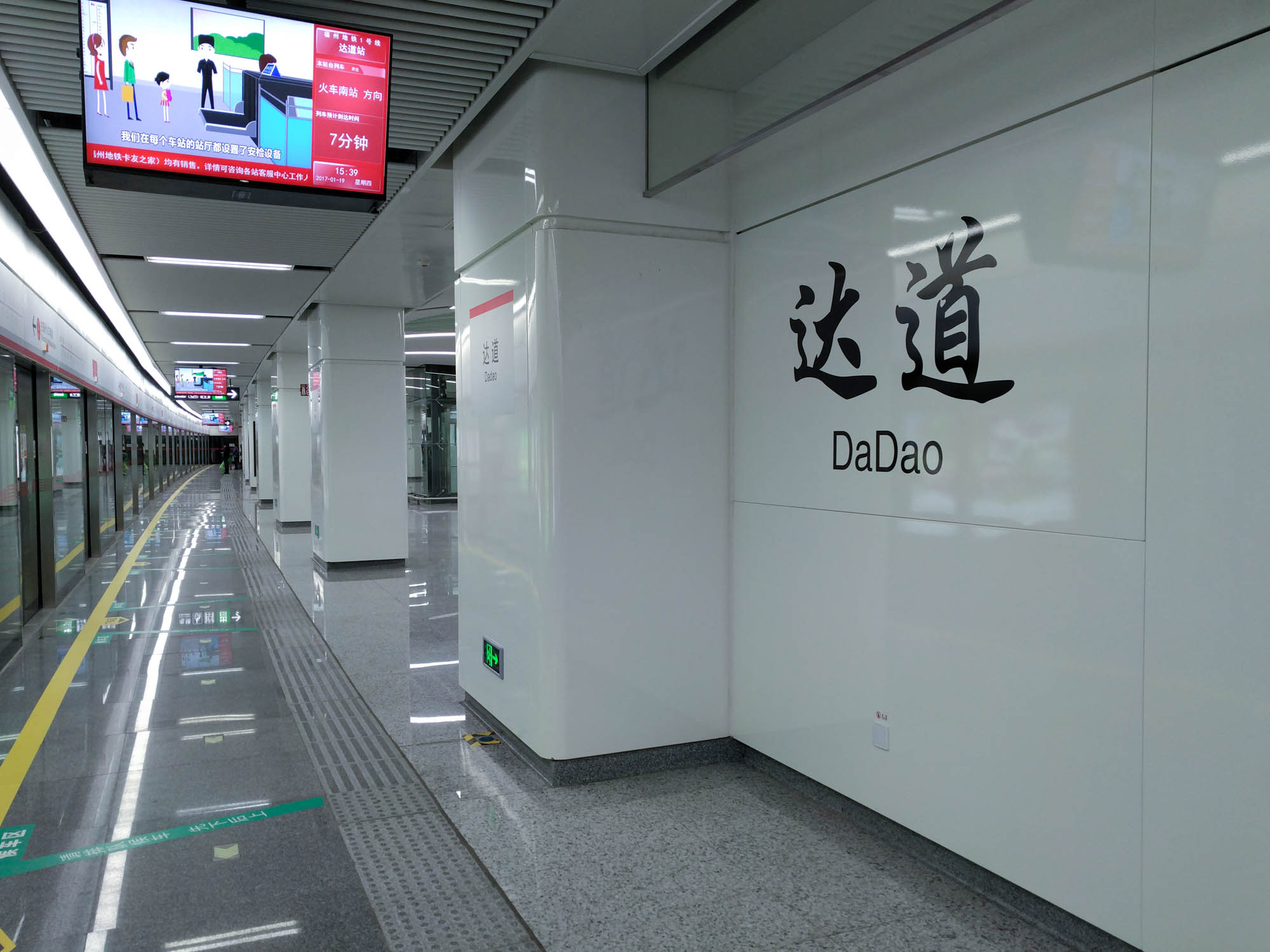 中文（中国大陆）: 福州地铁达道站站名壁